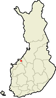 Kruunupyyn sijainti